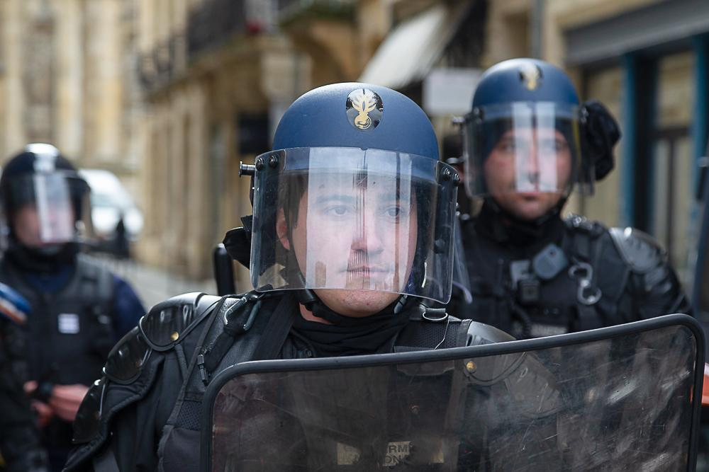 Les Gilets Jaunes